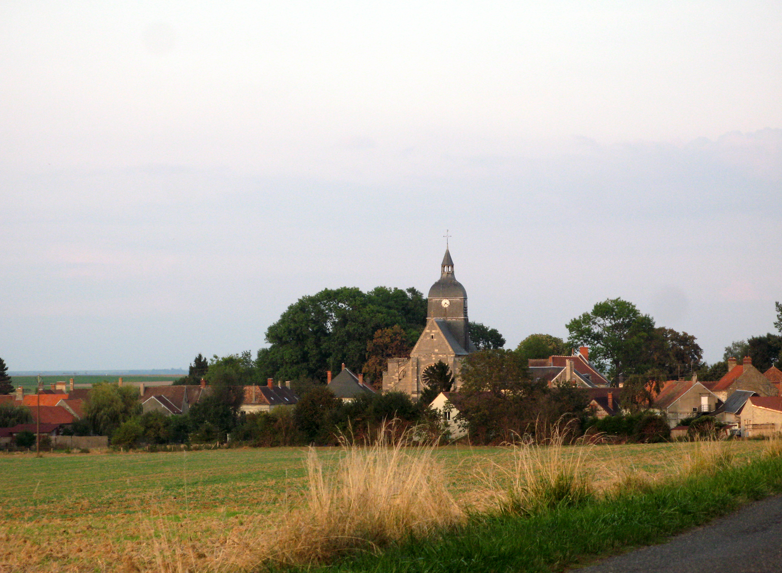 Arcy-Sainte-Restitue (Aisne, France) - Panorama sur la localité.